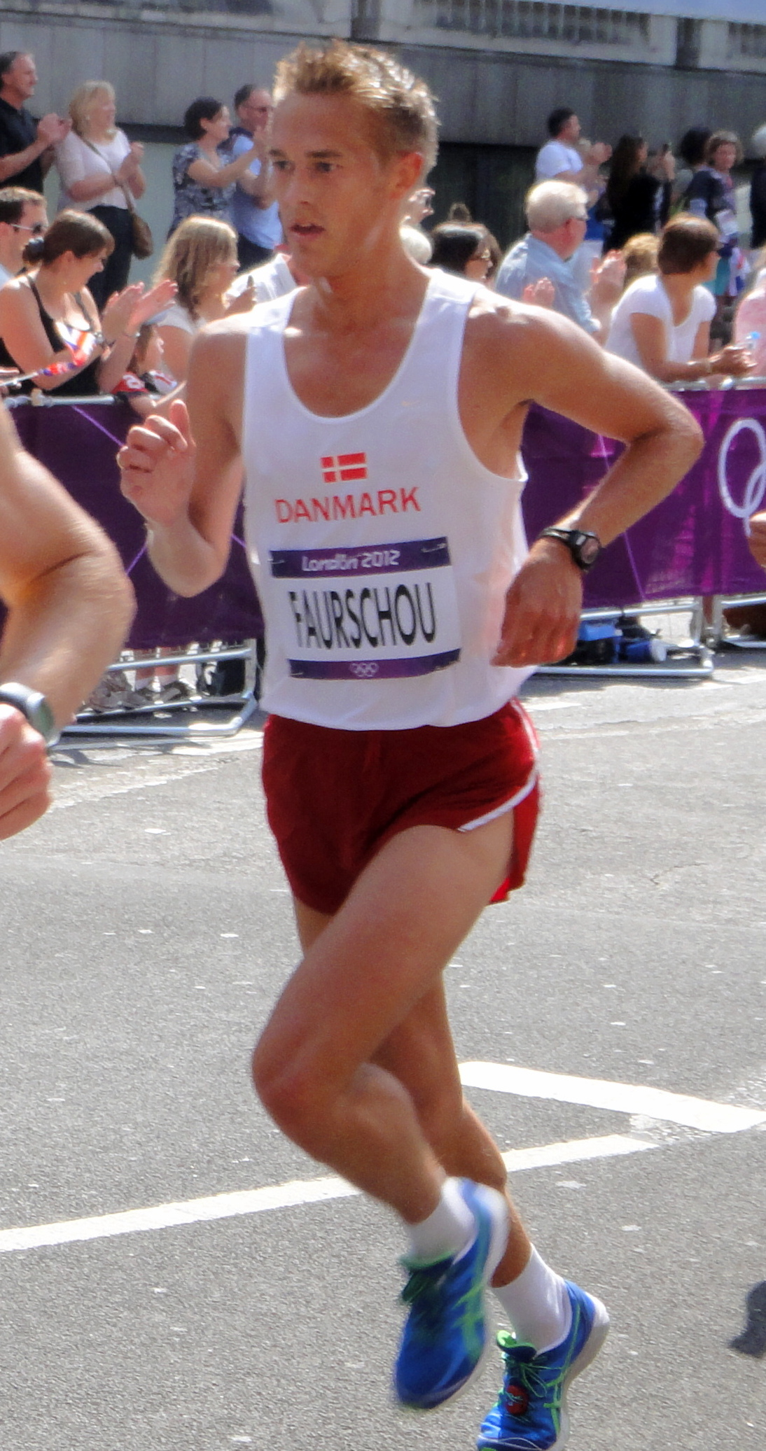 Ram Singh Yadav (India) & Sinkweon Jang (Korea) - London 2012 Men's Marathon